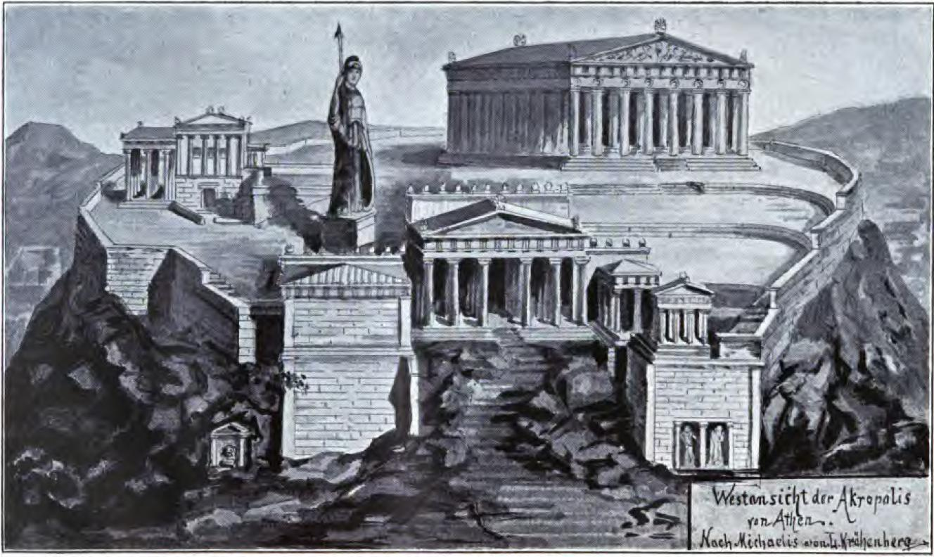 Westansicht der Akropolis von Athen zur Zeit Perikles